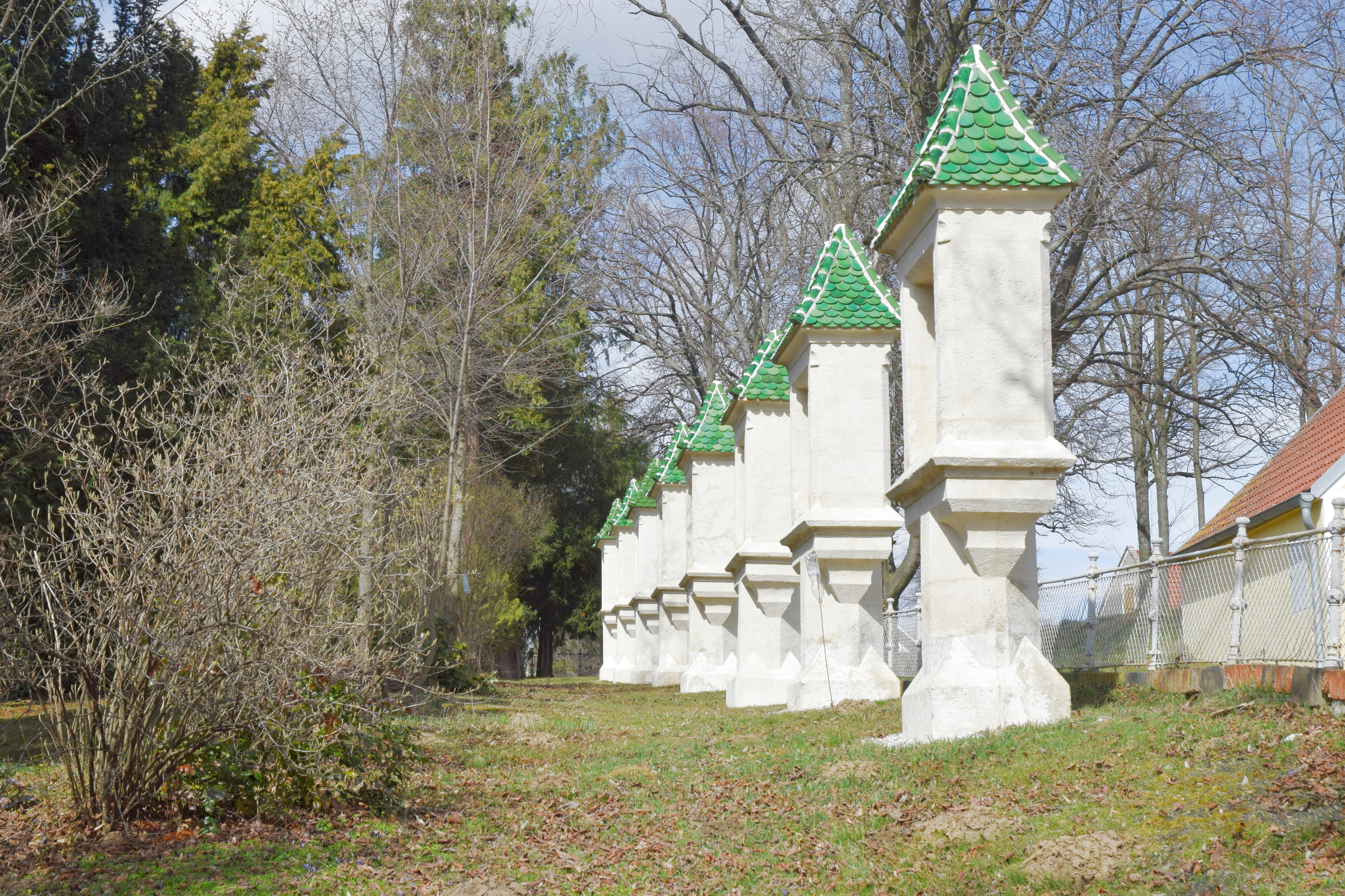 Rosenkranzstationen vor der Pfarrkirche hl. Bartholomäus in Katzelsdorf